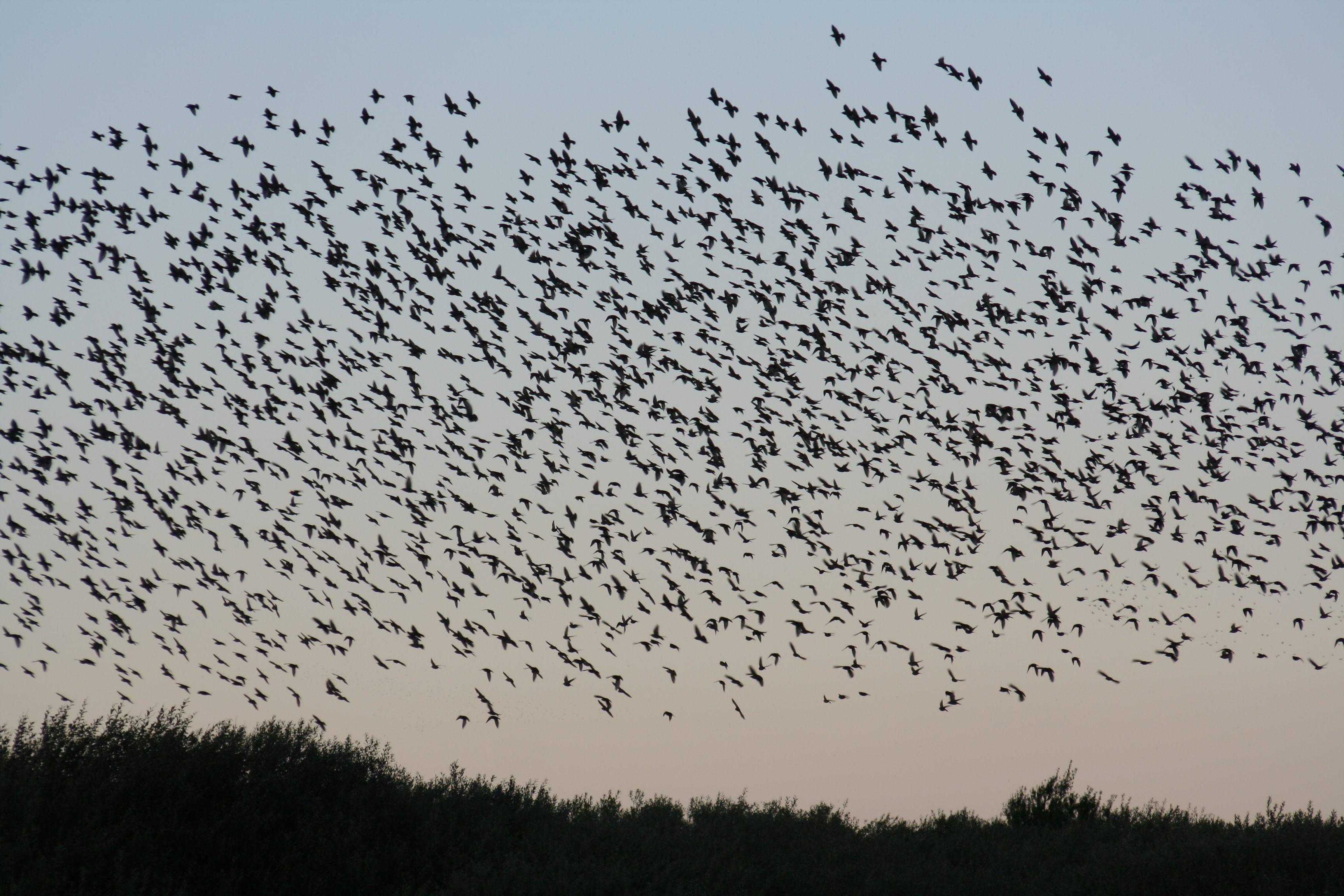 Starenschwarm auf Rømø